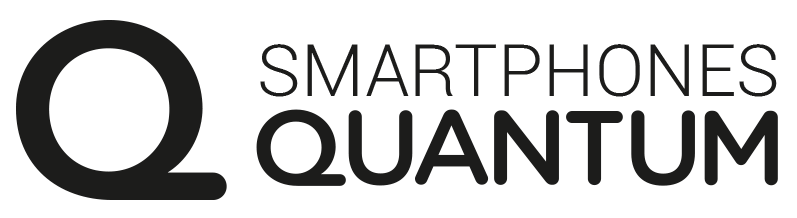 Logo Quantum News